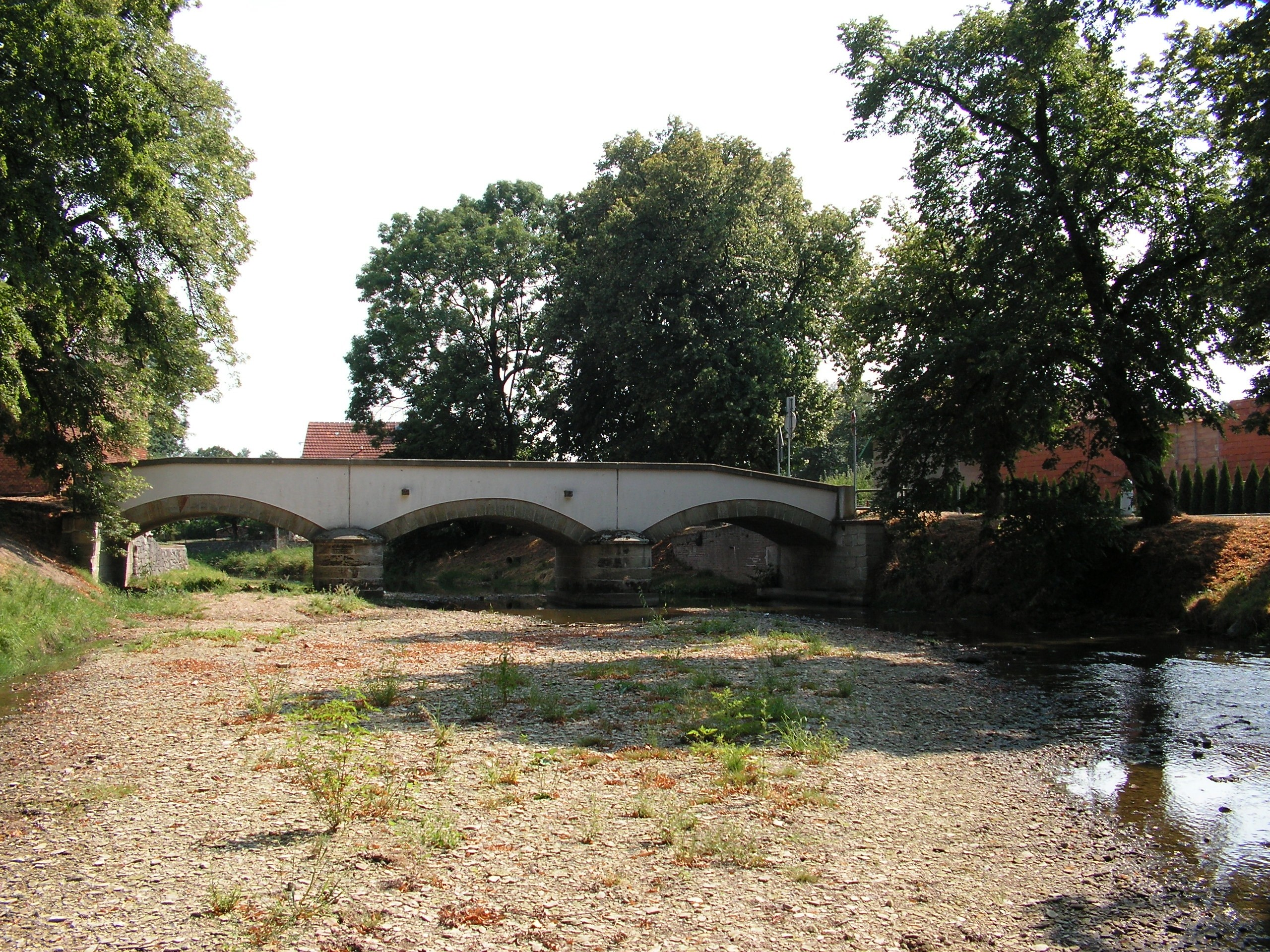 Řeka Novohradka v Lozicích za nízkého stavu vody v srpnu 2015